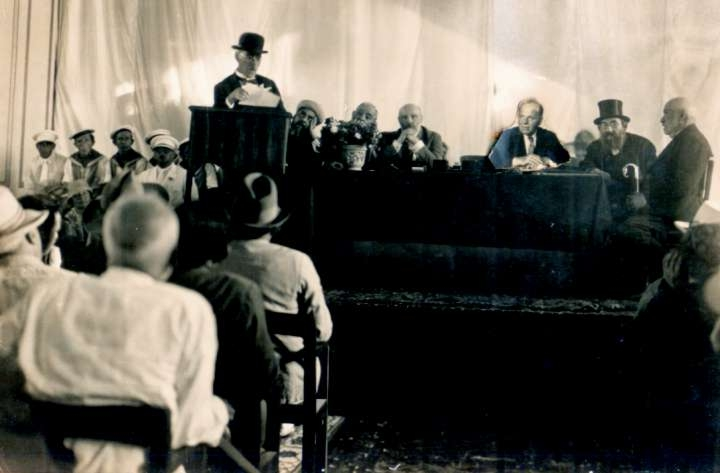 שמואל בלום נואם בתל אביב, שלישי מימין חיים נחמן ביאליק